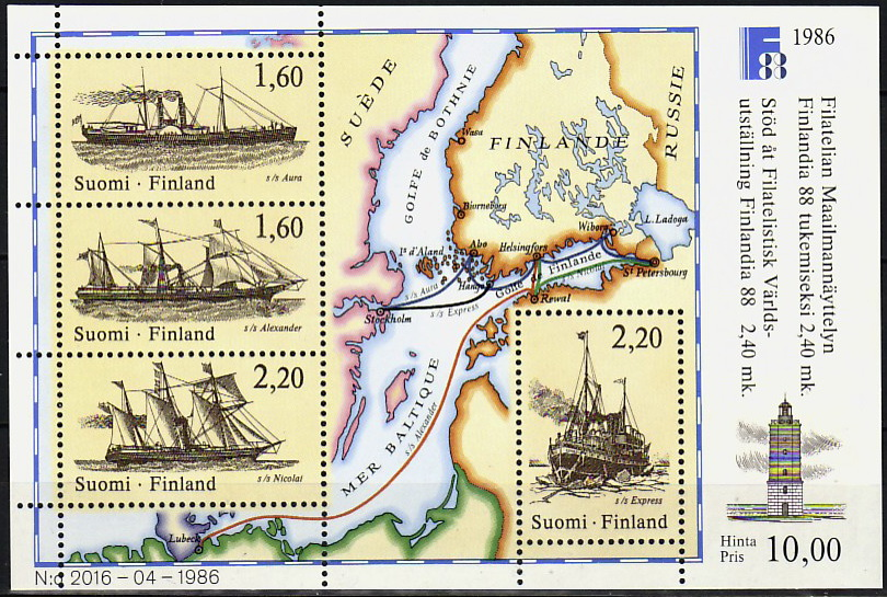 Почтовый блок Финляндии, посвящённый перевозкам почтовыми кораблями, 1986.